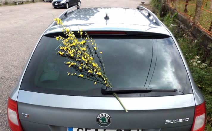 Os Maios